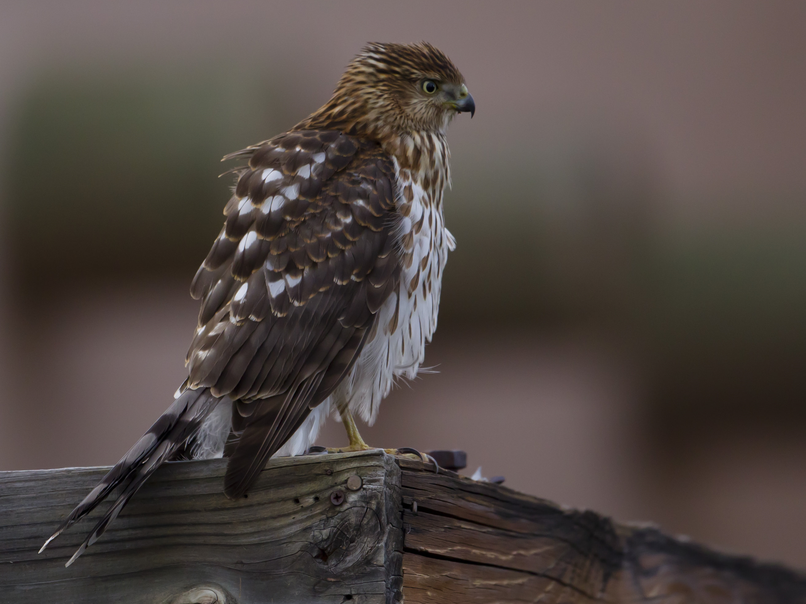 Accipiter cooperii